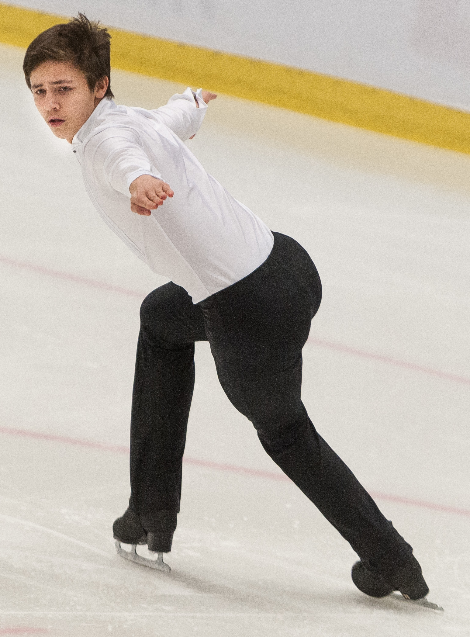 Illya Solomin tävlar i friåkning, SKF SM 2015